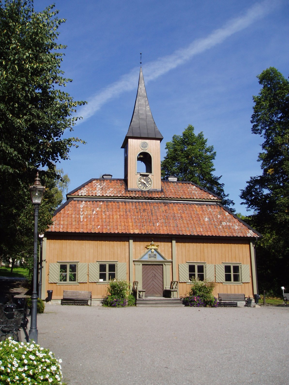 stadshuset, Sigtuna.